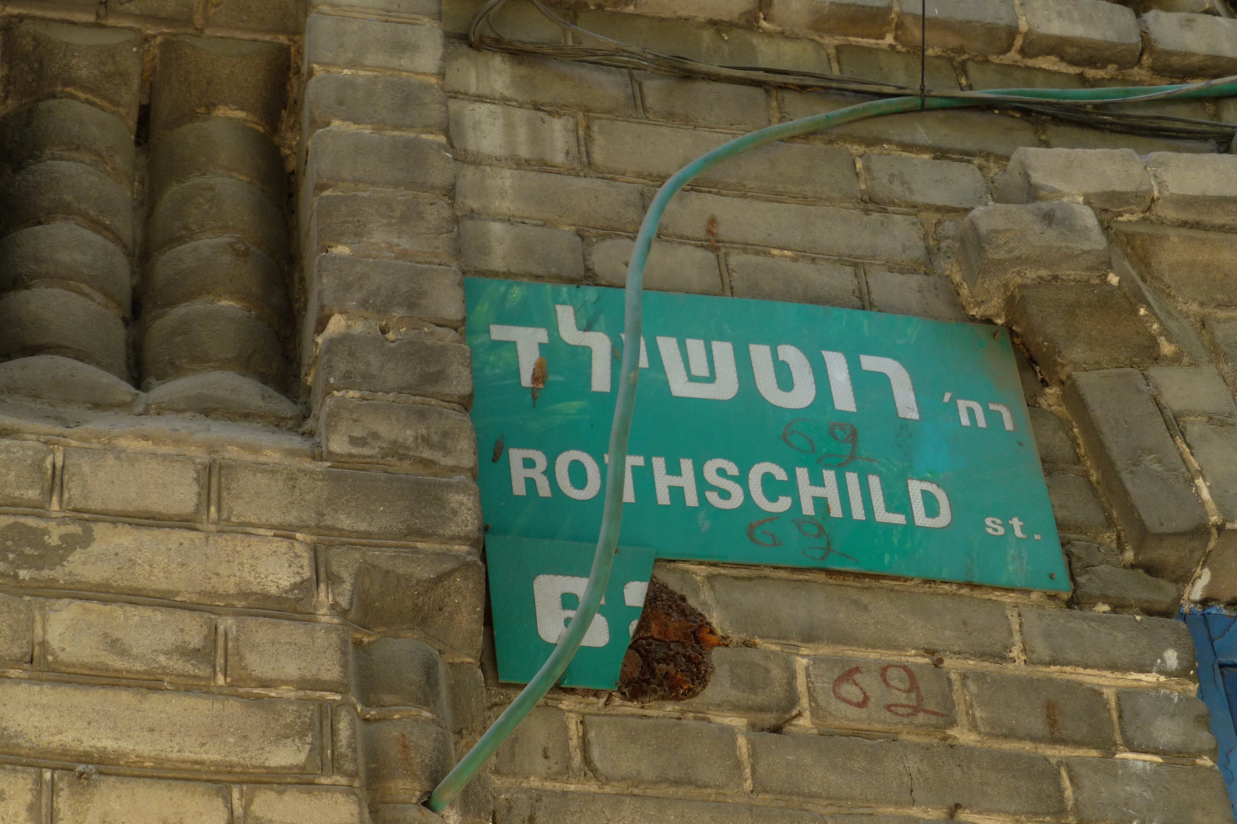 הבית, על חלקה של גודמן, נבנה בדגם בתים דומים בפולין על ידי מרדכי רוטברד ובניו.